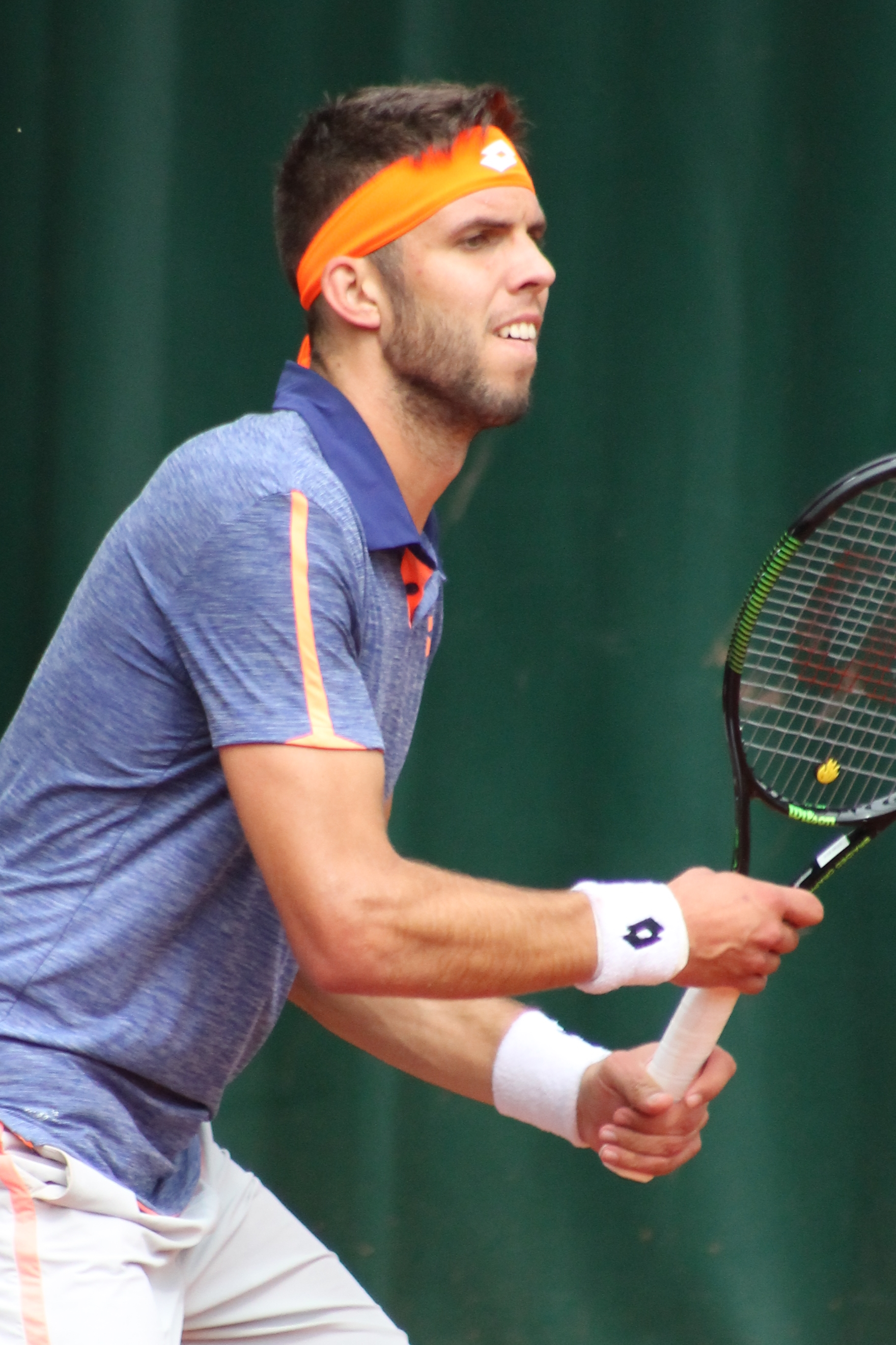 Vesely RG16 (2)